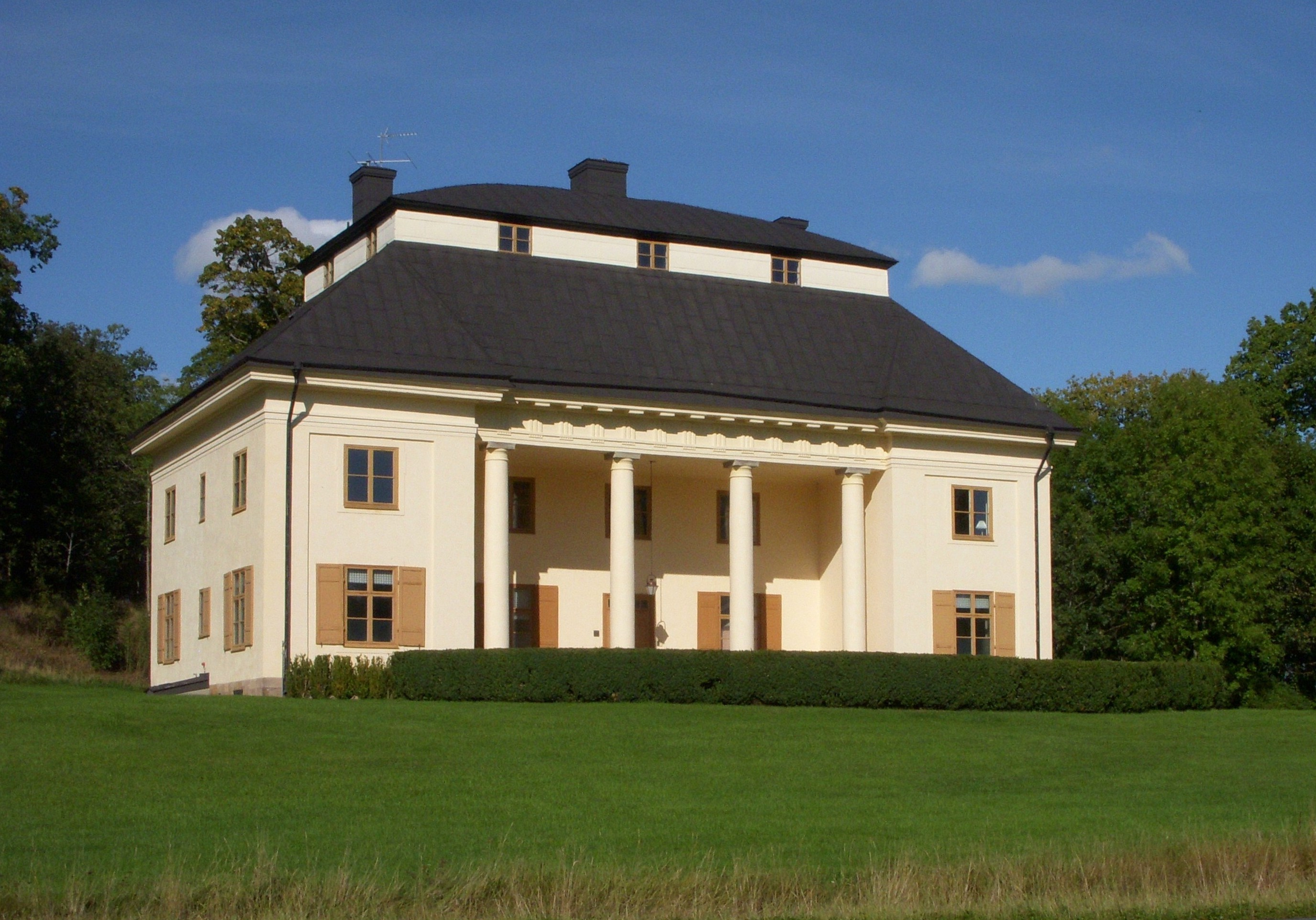 Byggnaden "Hemmet" (f.d. ståthållarbostaden) på Drottningholm